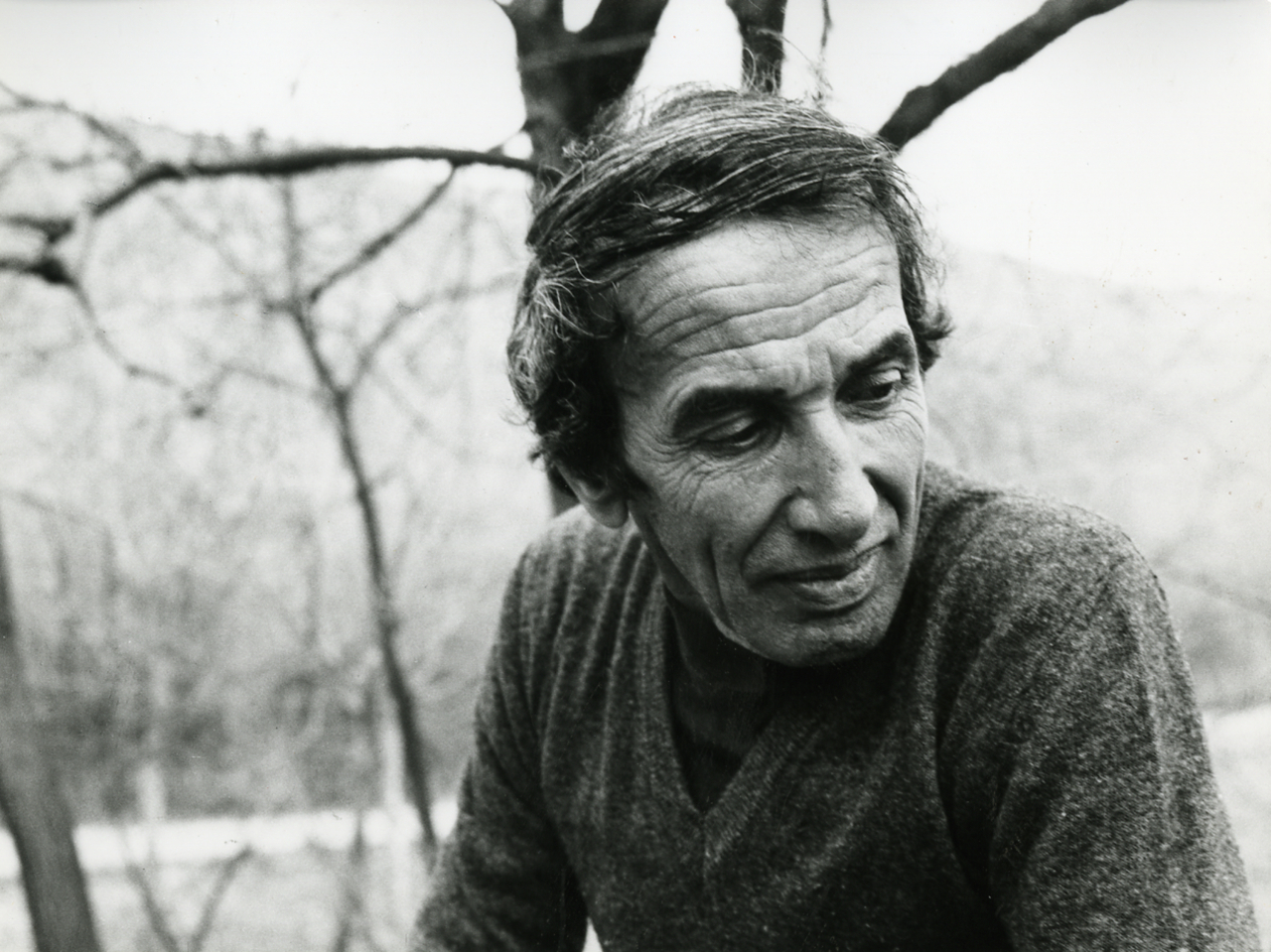 Località non identificata. Esterni. Ritratti dell'artista Germano Sartelli. Servizio fotografico : Italia, 1975 / Paolo Monti. - Stampe: 6 : Positivo b/n, gelatina bromuro d'argento/ carta, 18x24. - ((Al verso delle stampe manoscritti i numeri dei negativi corrispondenti: 17863, 17865, 17867. - Sul coperchio della scatola iscrizione didascalica manoscritta a pennarello nero: "Scultura/ Arte Moderna - scultura". - Il negativo identificato con il numero 46397 è stato realizzato per Zodiac. - Fonte: Agenda di Paolo Monti: 4/ 30 marzo 1971/ / dal N° 16824 al N° 17956 (1971-1976), presso Archivio Paolo Monti. - Fonte: Monografia di Calvesi M., Castagnoli P. G., Emiliani A.: Germano Sartelli, catalogo della mostra, Bologna 1969, Bologna, Galleria De' Foscherari (1974). Calvesi M., Castagnoli P. G., Emiliani A. (a cura di)